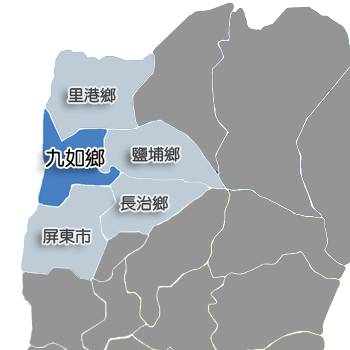 屏東縣九如鄉相對位置。